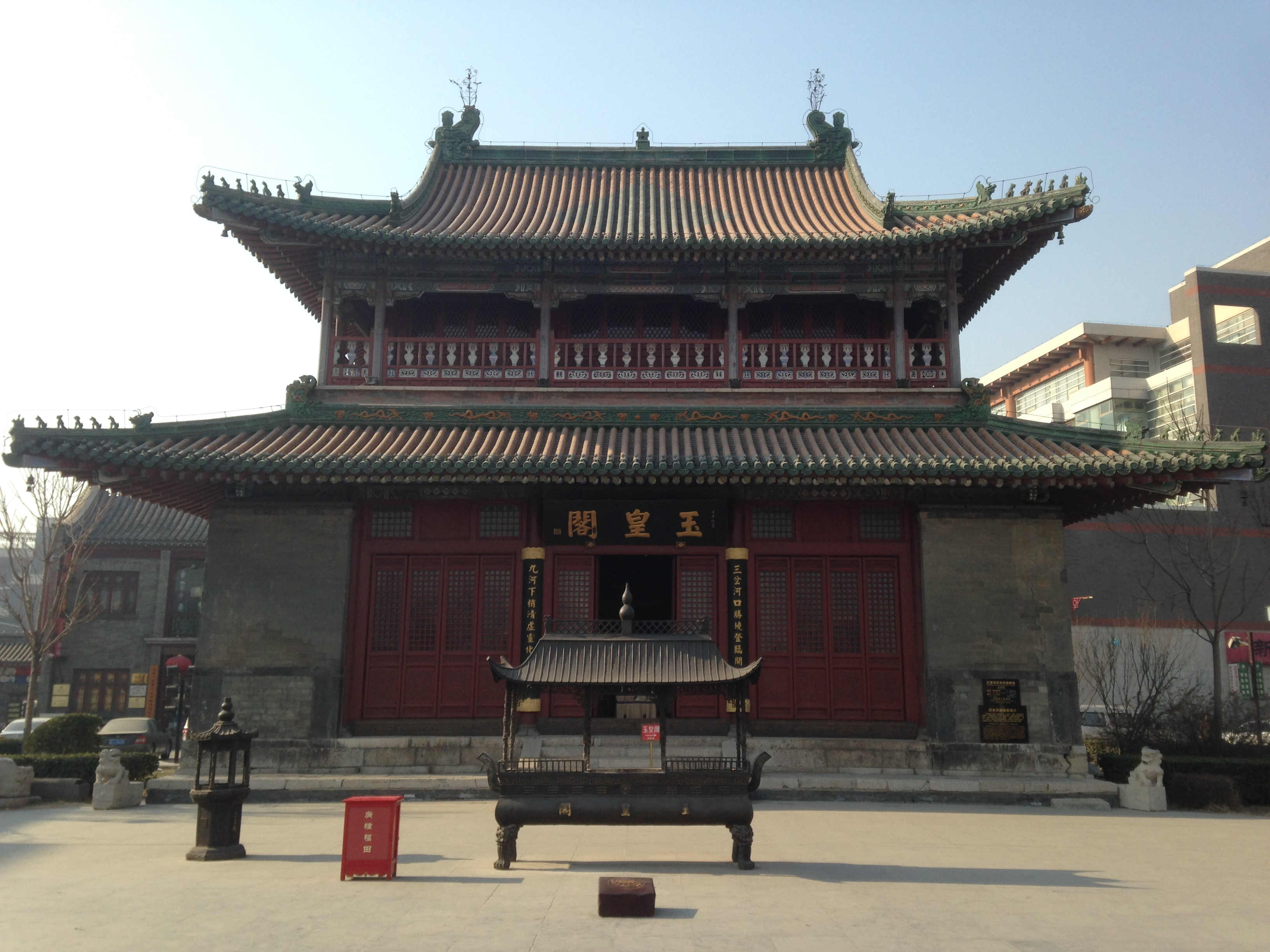 玉皇阁正面